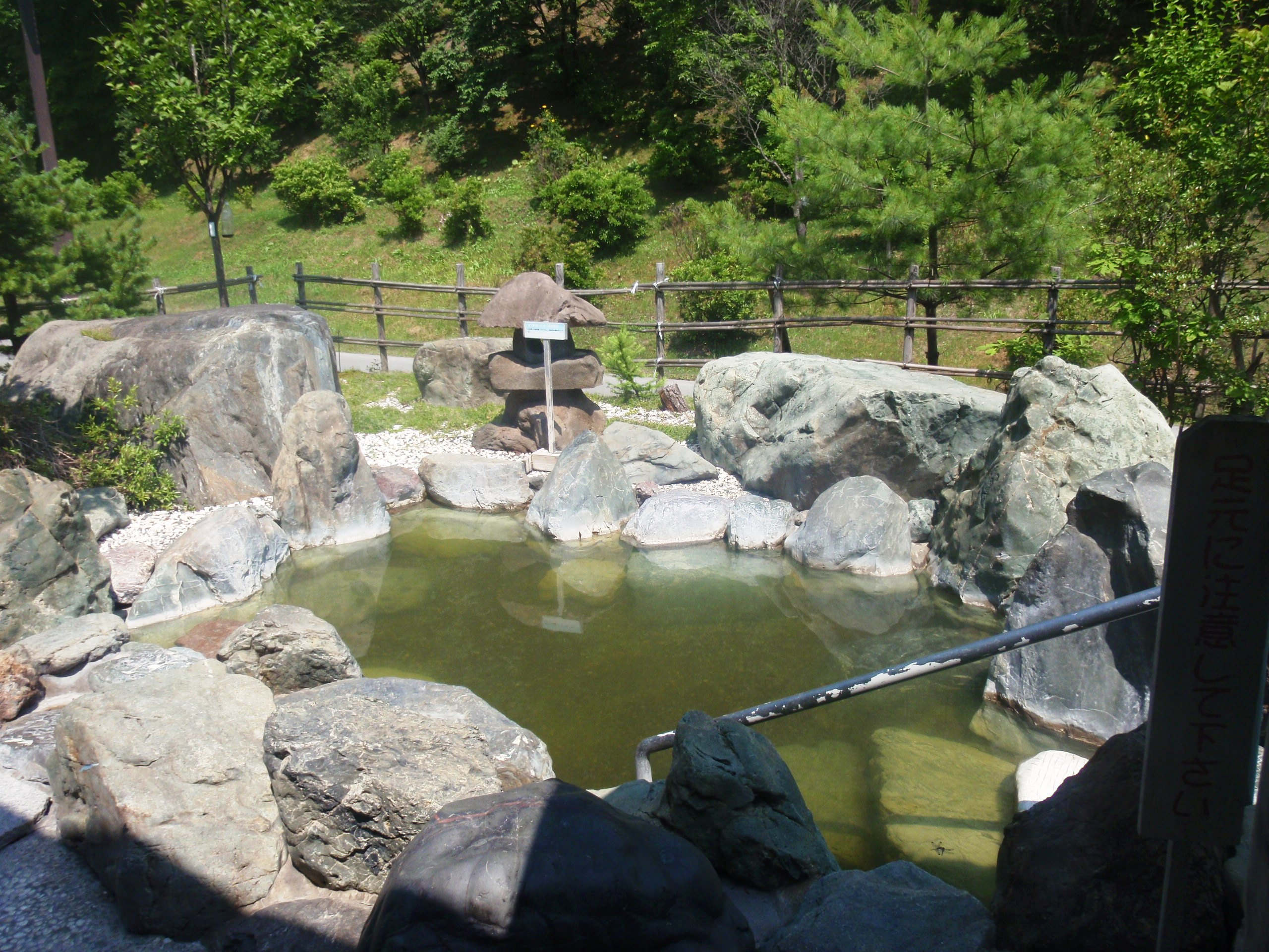 芦別温泉露天風呂